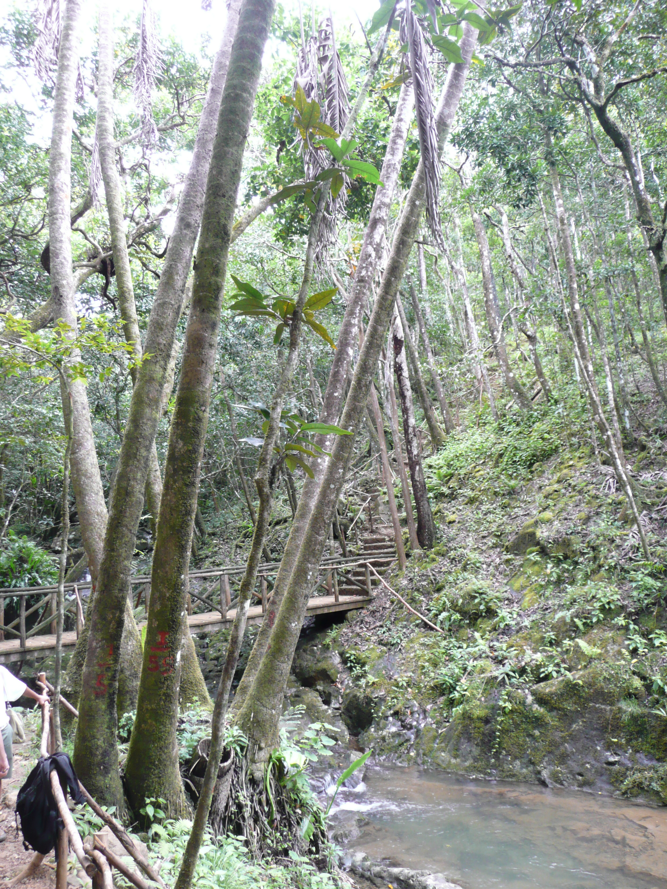 Eugenia bojeri in Vallée de Ferney in Mauritius Map: 20° 21' 45" S 57° 42' 22" E